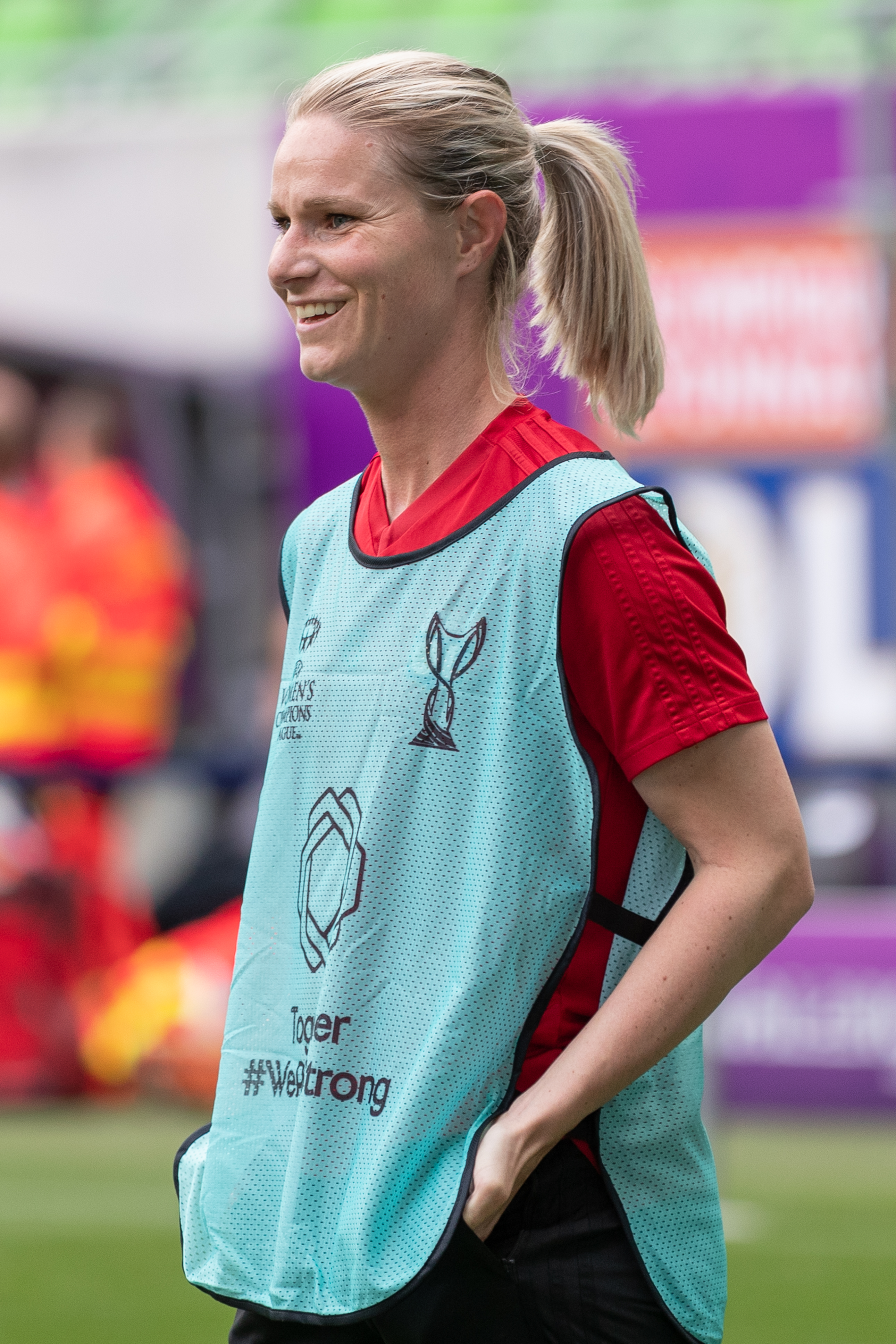 Fußball, Frauen, UEFA Women's Champions League, Olympique Lyonnais - FC Barcelona; Amandine Henry (Olympique Lyon, 6); beim Abschlusstraining